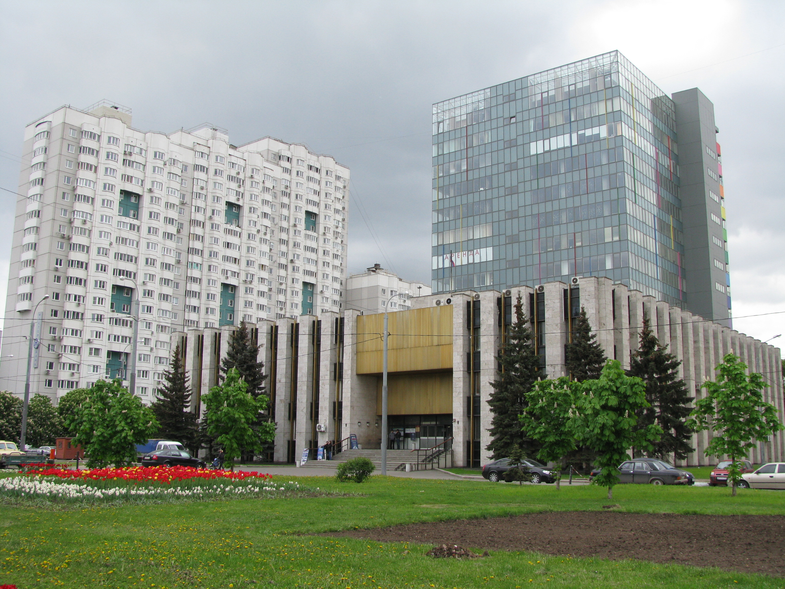 Perovo municipal division administration/Администрация района Перово